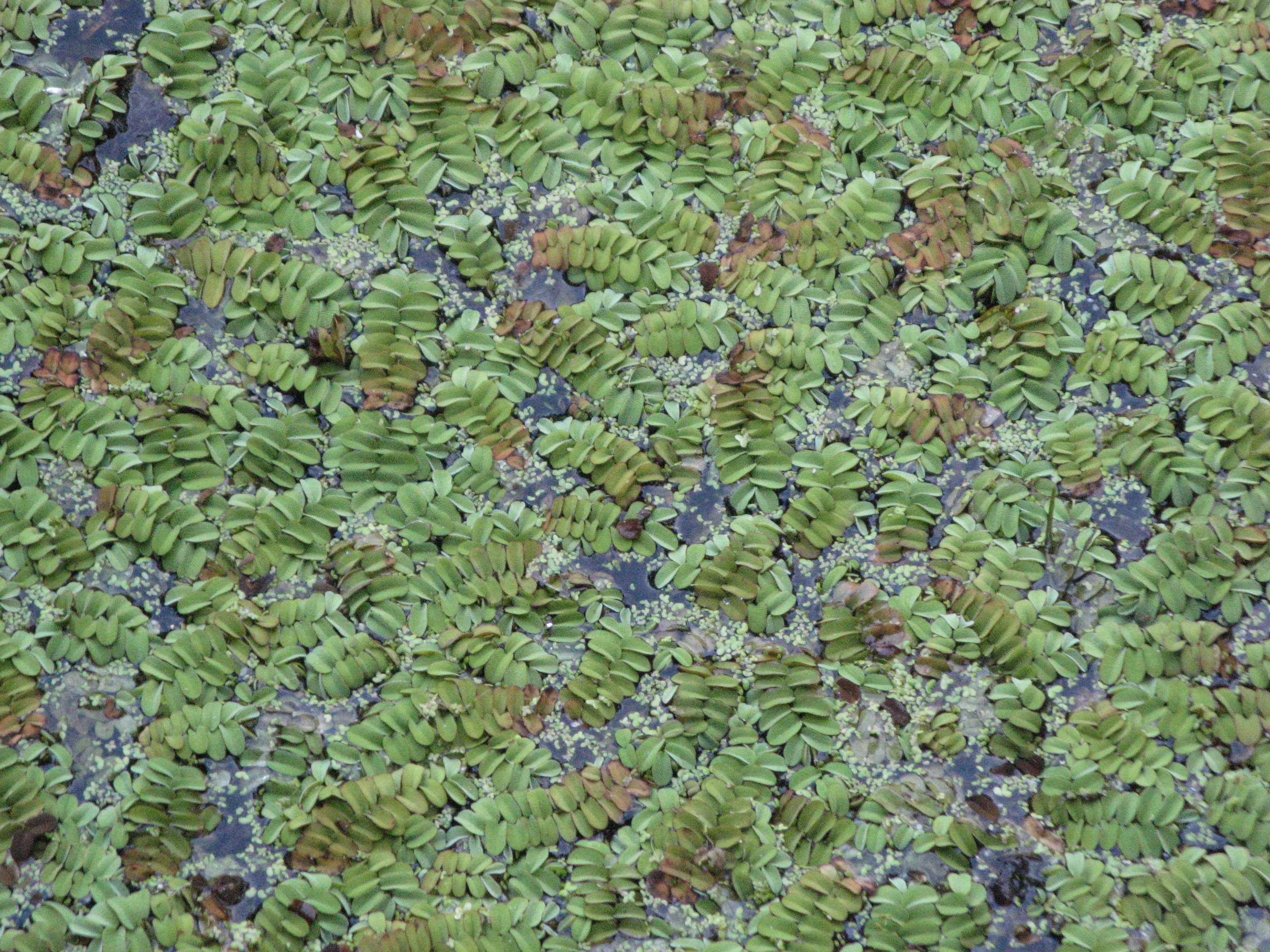 Salwinia pływająca (Salvinia natans) na naturalnym stanowisku w Rezerwacie Przyrody Łężczok koło Raciborza.